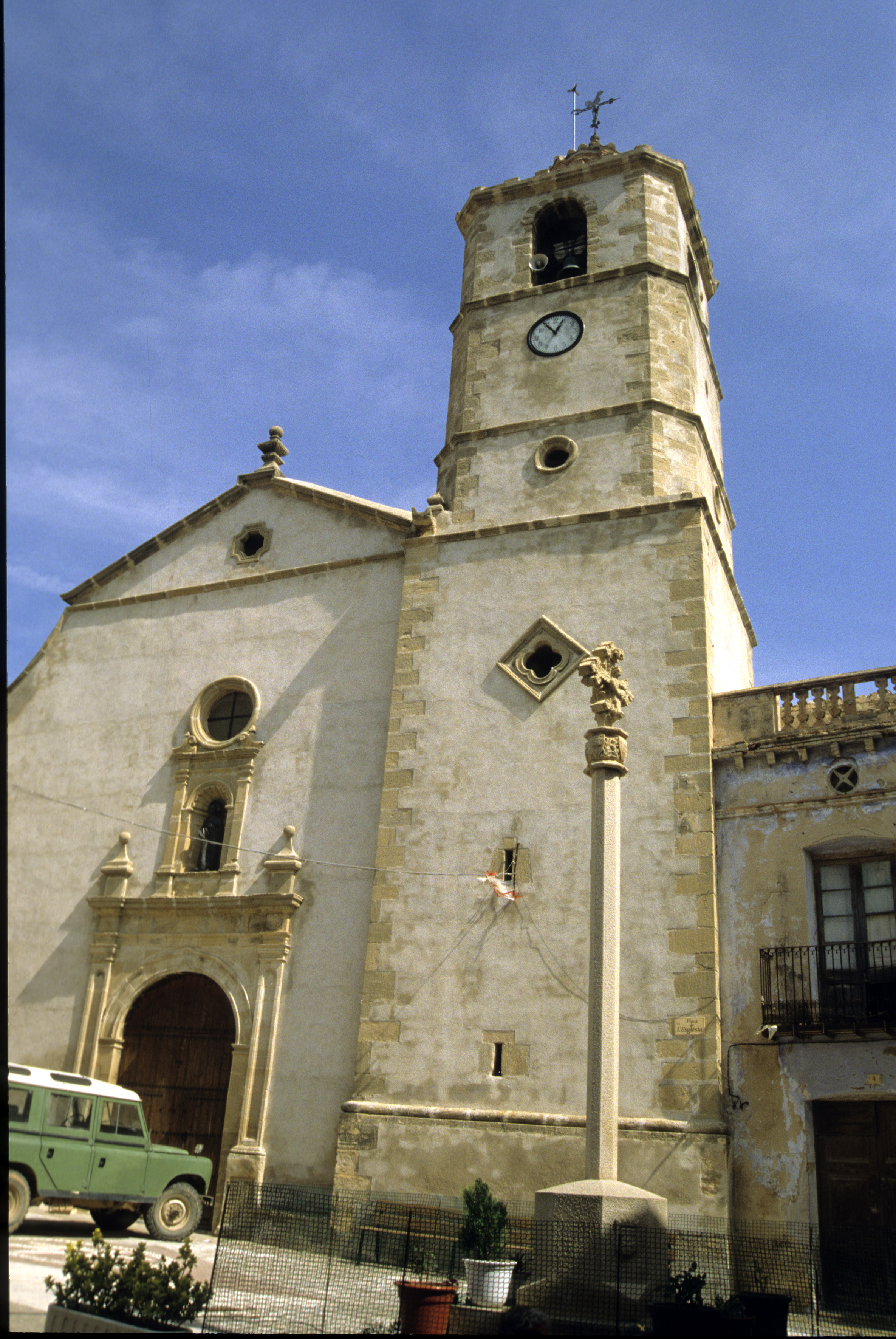 Prat de Comte (Terra Alta). Parroquial de Sant Bartomeu, façana. Fot. 1998.